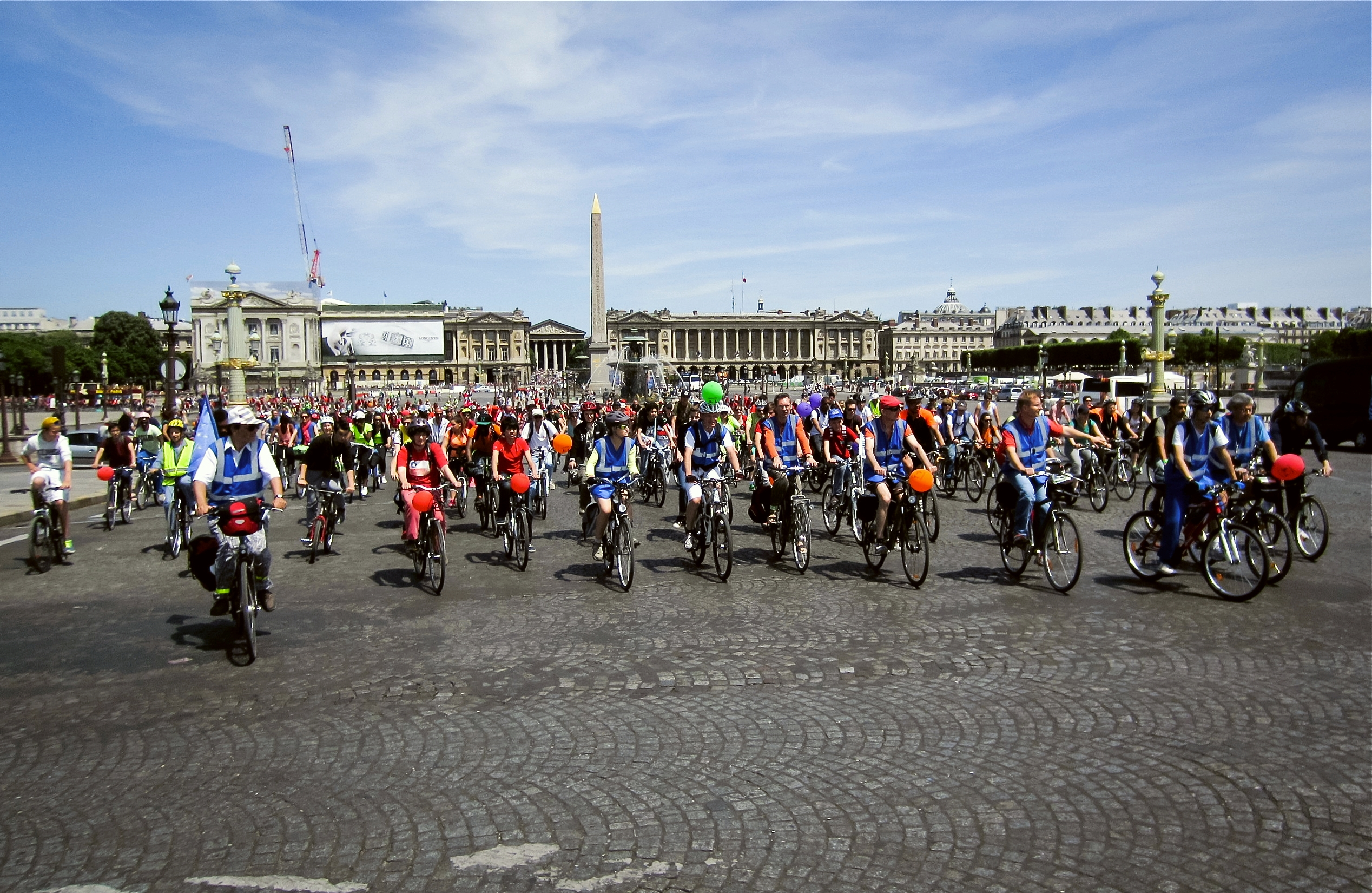 Convergence Francilienne, la fête du vélo - Paris le 7 juin 2015.